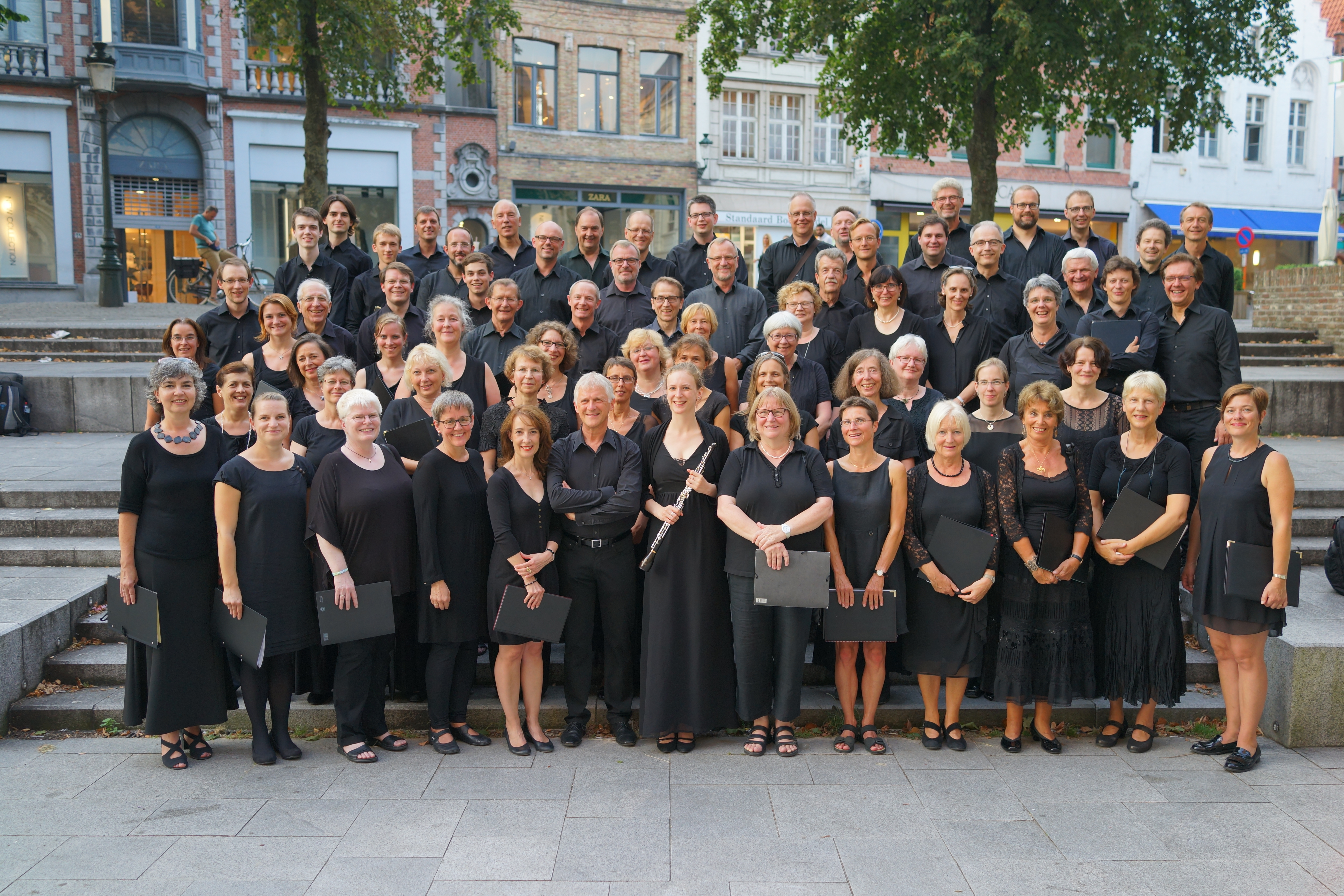 Vor der St. Salvator-Kathedrale, Brugge, Belgien